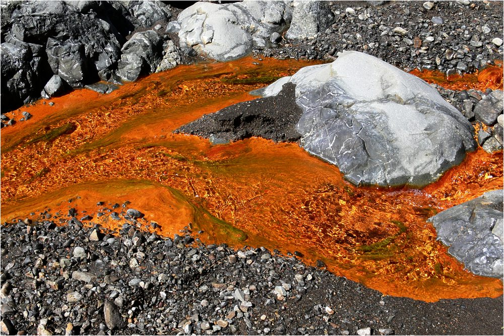 Limonitausfällung am Grund eines Baches in der Caldera de Taburiente, La Palma